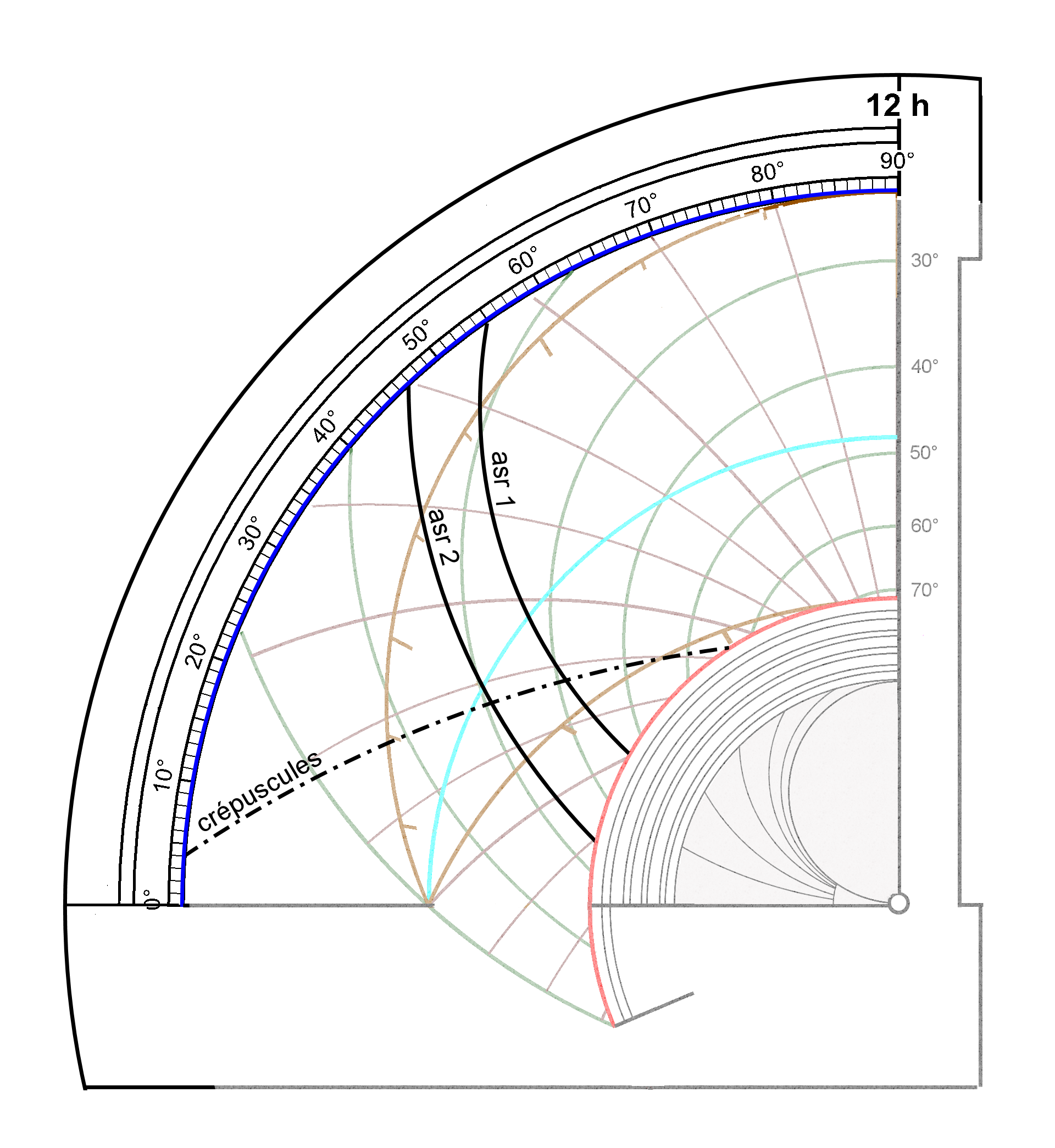 Tracé de la prière d'asr et des crépuscules pour une latitude de 42°